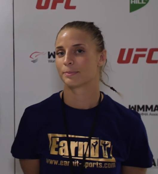 Bianca Antman: "Jag fokuserade på hennes game" | IMMAF European Open Championships '19